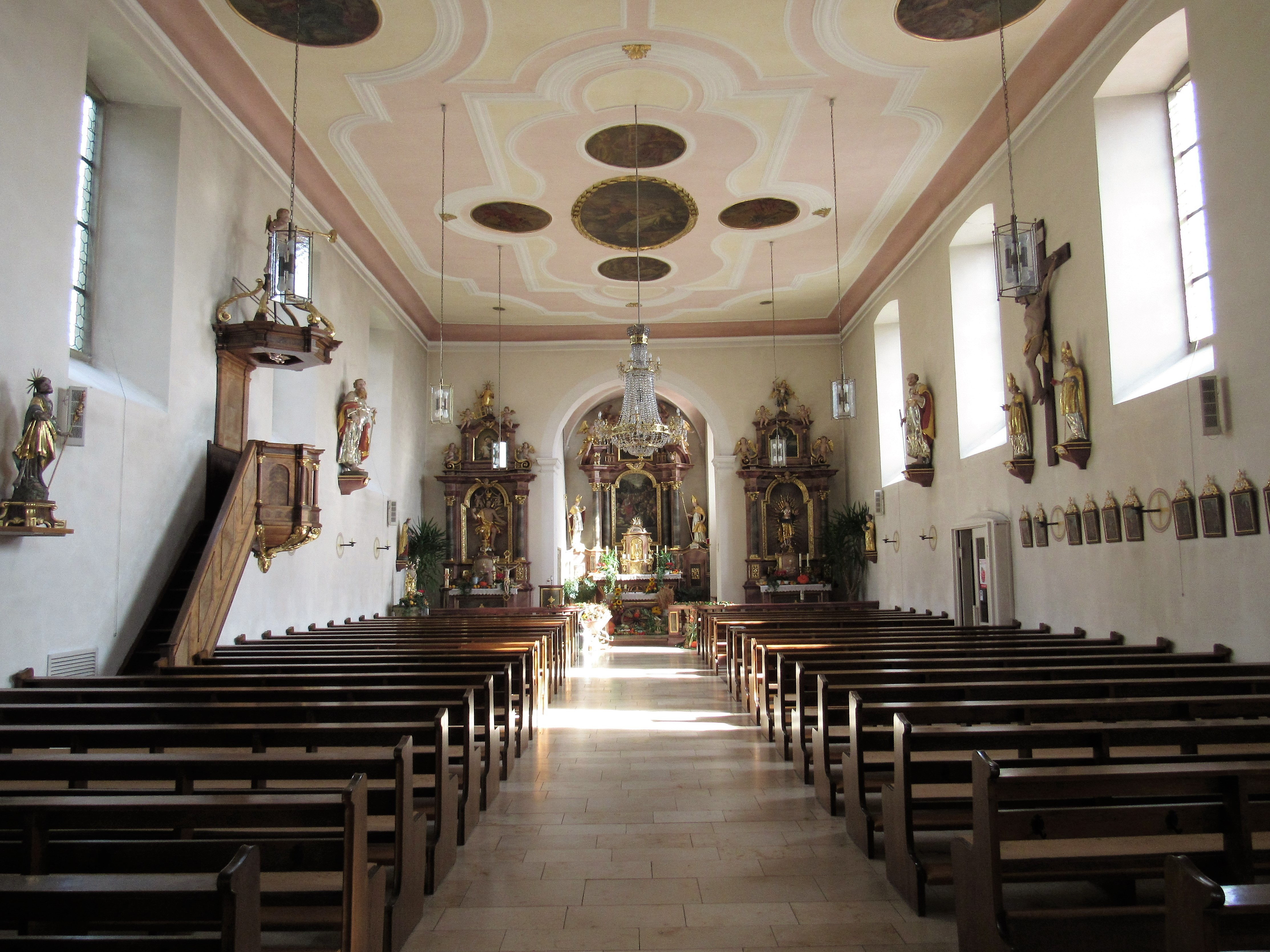 Inneres St. Bonifatius Rannungen